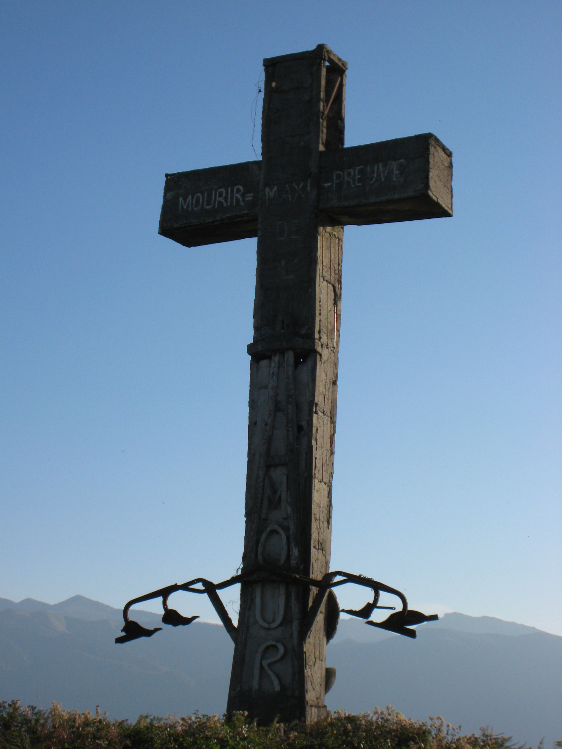 Croix d'Escou érigée par le curé Camblong (Pyrénées Atlantiques) Pyrénées).